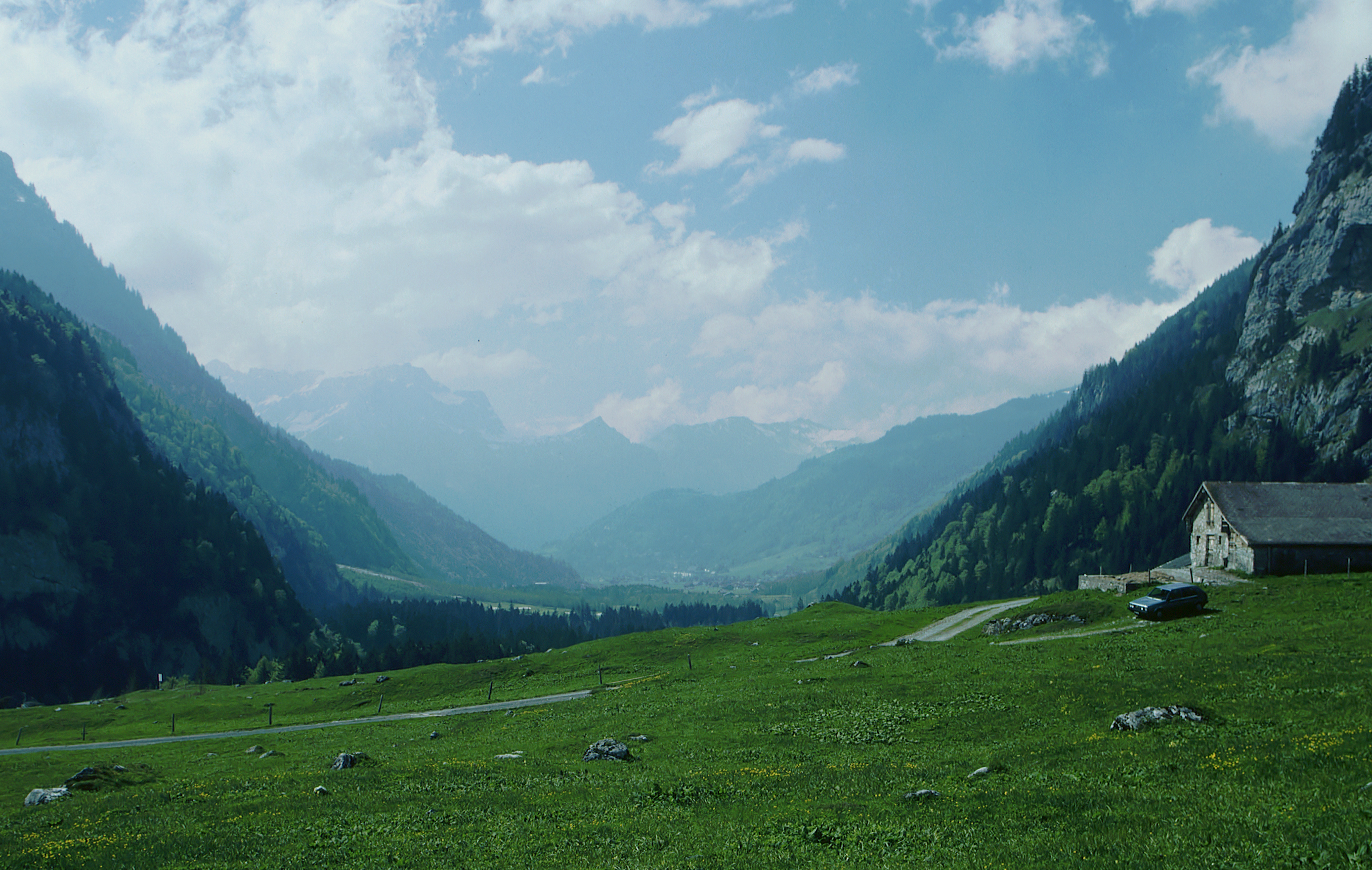 Oberes Engelbergertal - Blick vom Anfang in Richtung Engelberg/Zentralschweiz